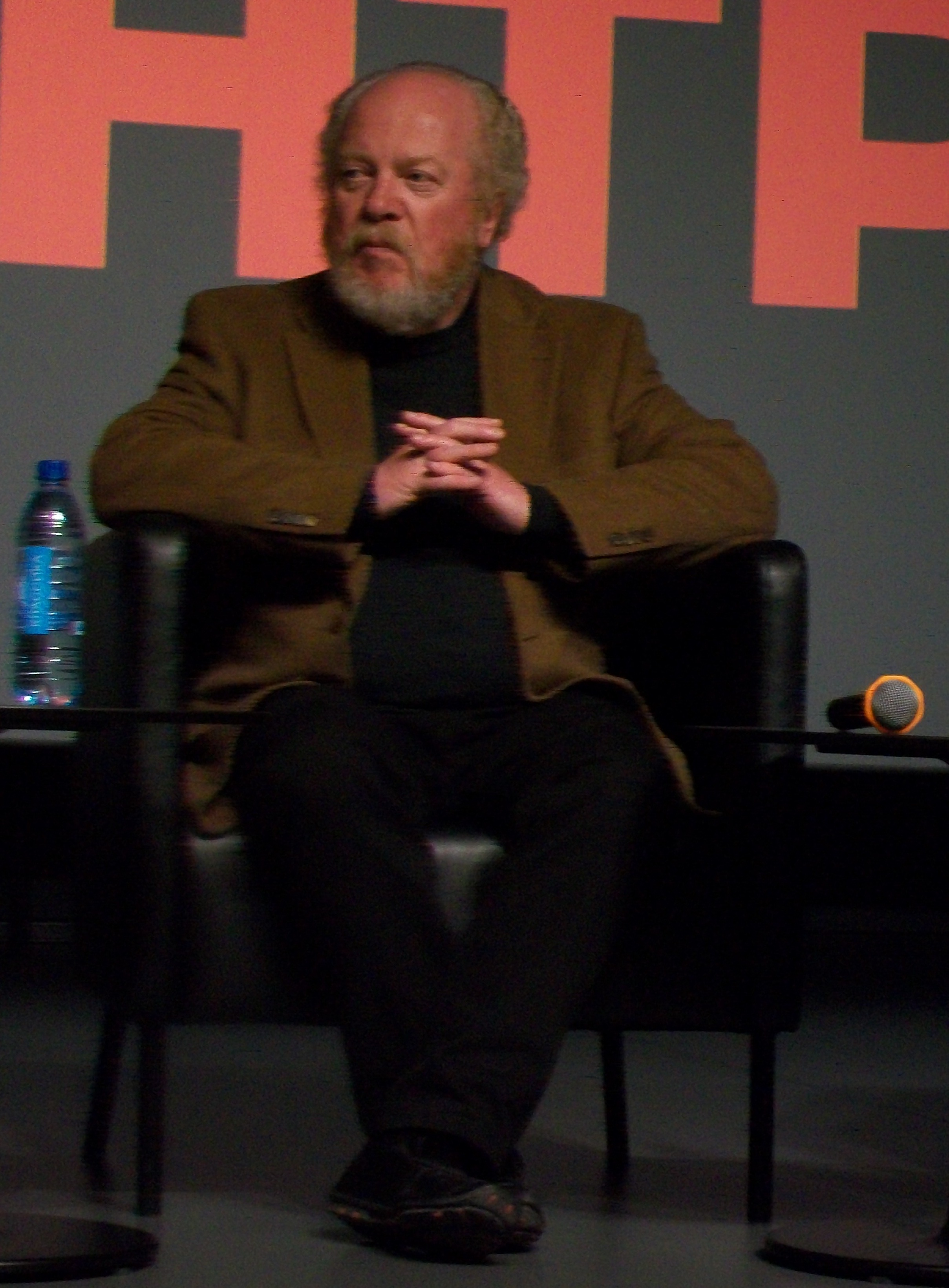 Герхард Опитц (Опиц, Оппитц) в Екатеринбурге, в Ельцин-центре на презентации документального фильма о себе. 12 октября 2017 года